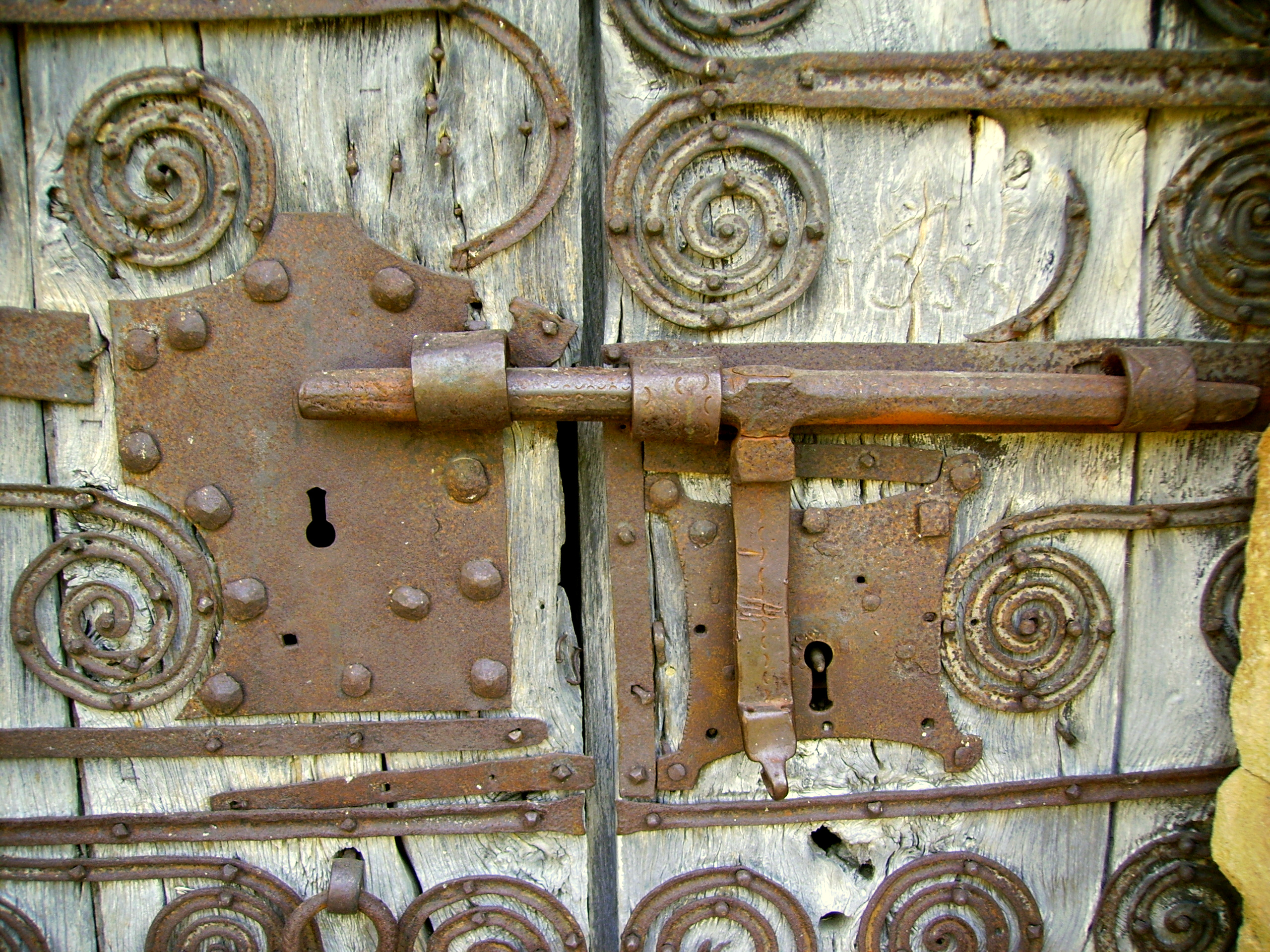 Església parroquial de Santa Eulàlia (Cornellà del Terri)